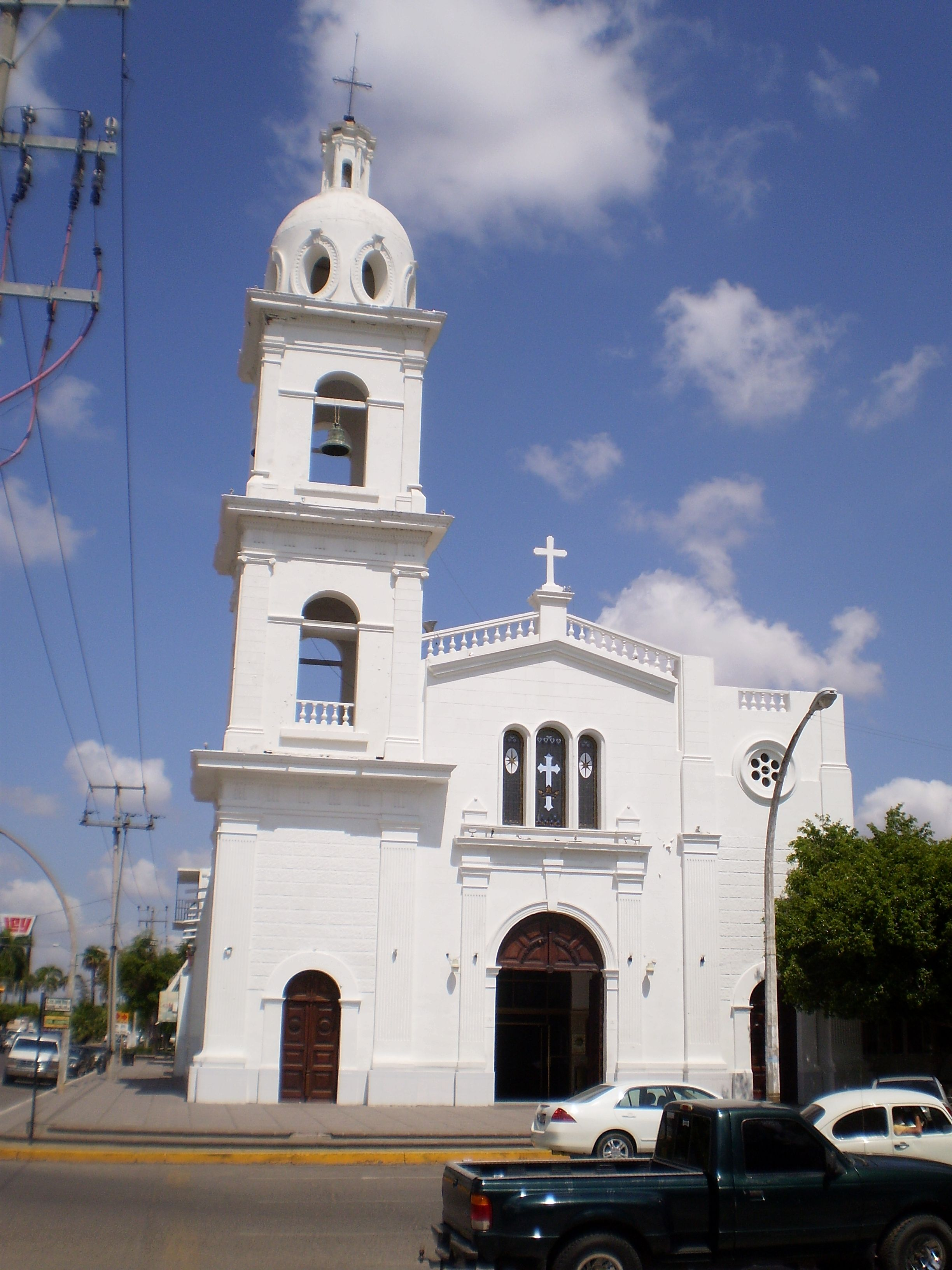 Iglesia del Sagrado Corazón de Jesús. Los Mochis, Ahome, Sinaloa, México